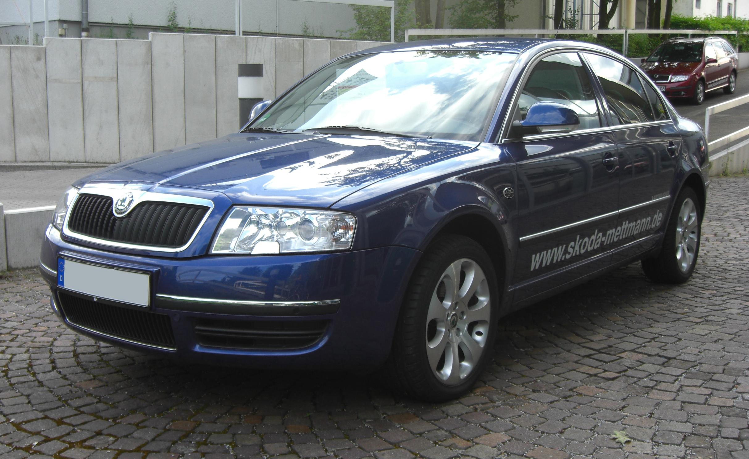 Skoda Superb